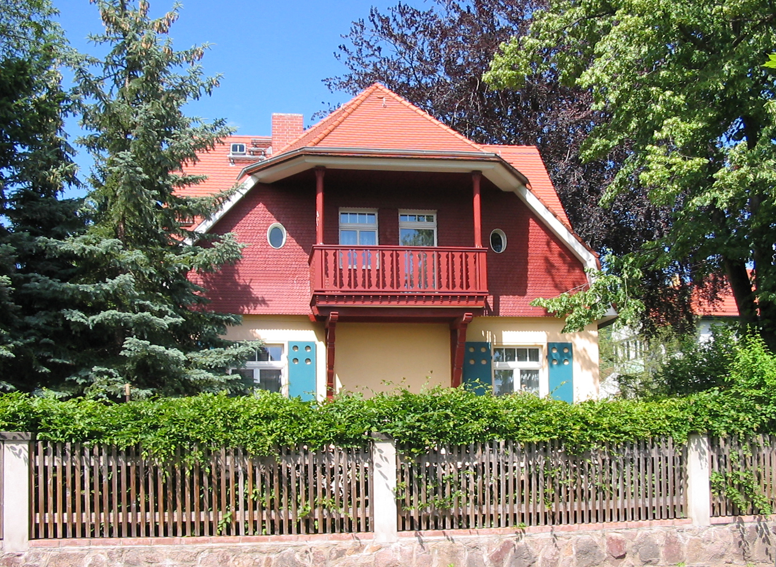 Radebeul, Villenkolonie Altfriedstein, Landhaus Lutzmann, Giebelseite